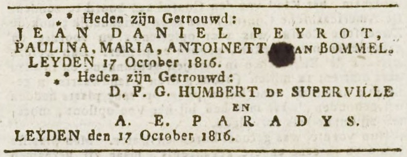 Huwelijksadvertentie D.P.G. Humbert de Superville en A.E. Paradys, Leiden, 17 oktober 1816. Afkomstig uit de Leydse Courant, nr. 126 (vrijdag 18 oktober 1816): [p. 2].